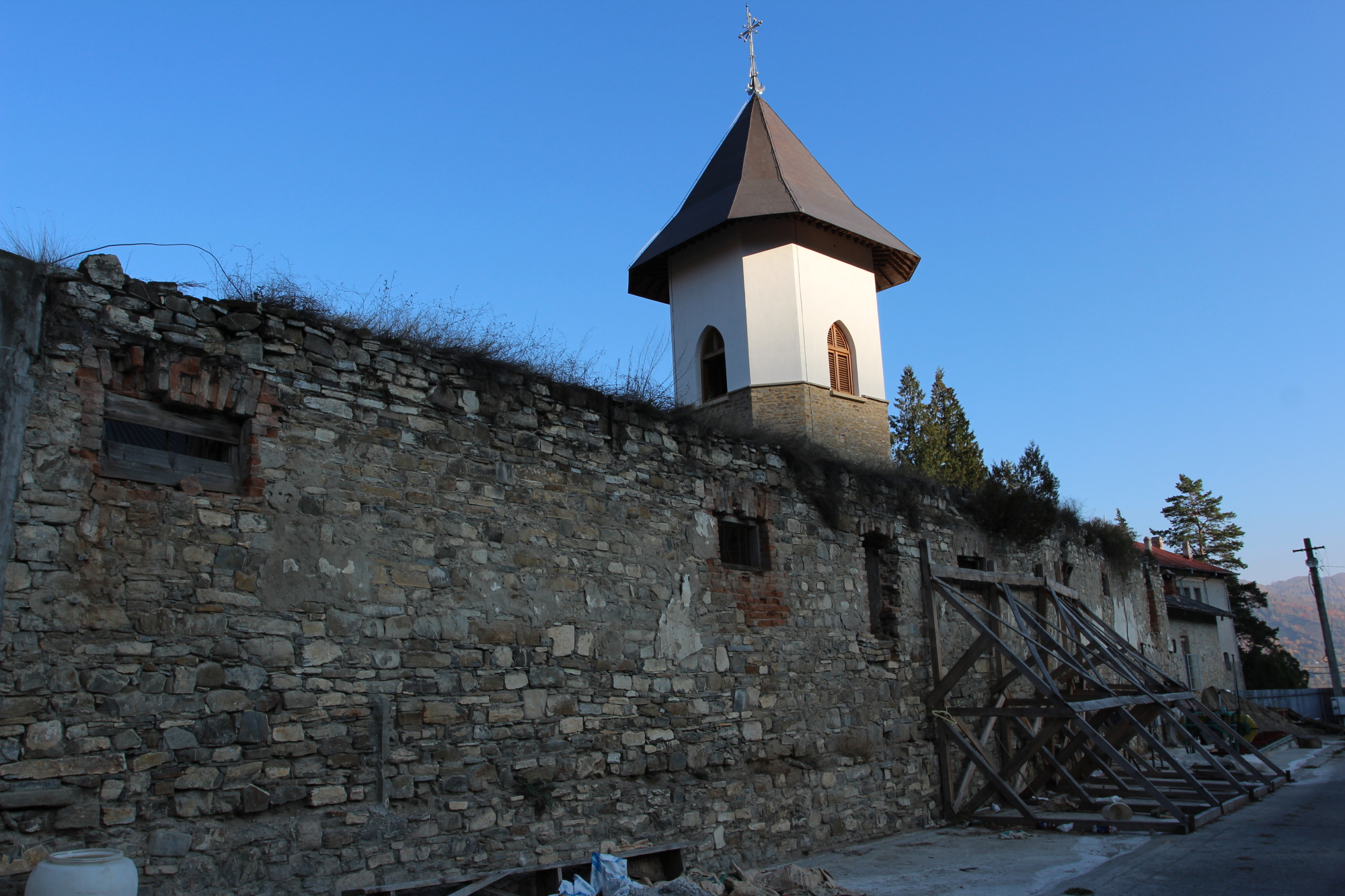 Zid de incintă 03